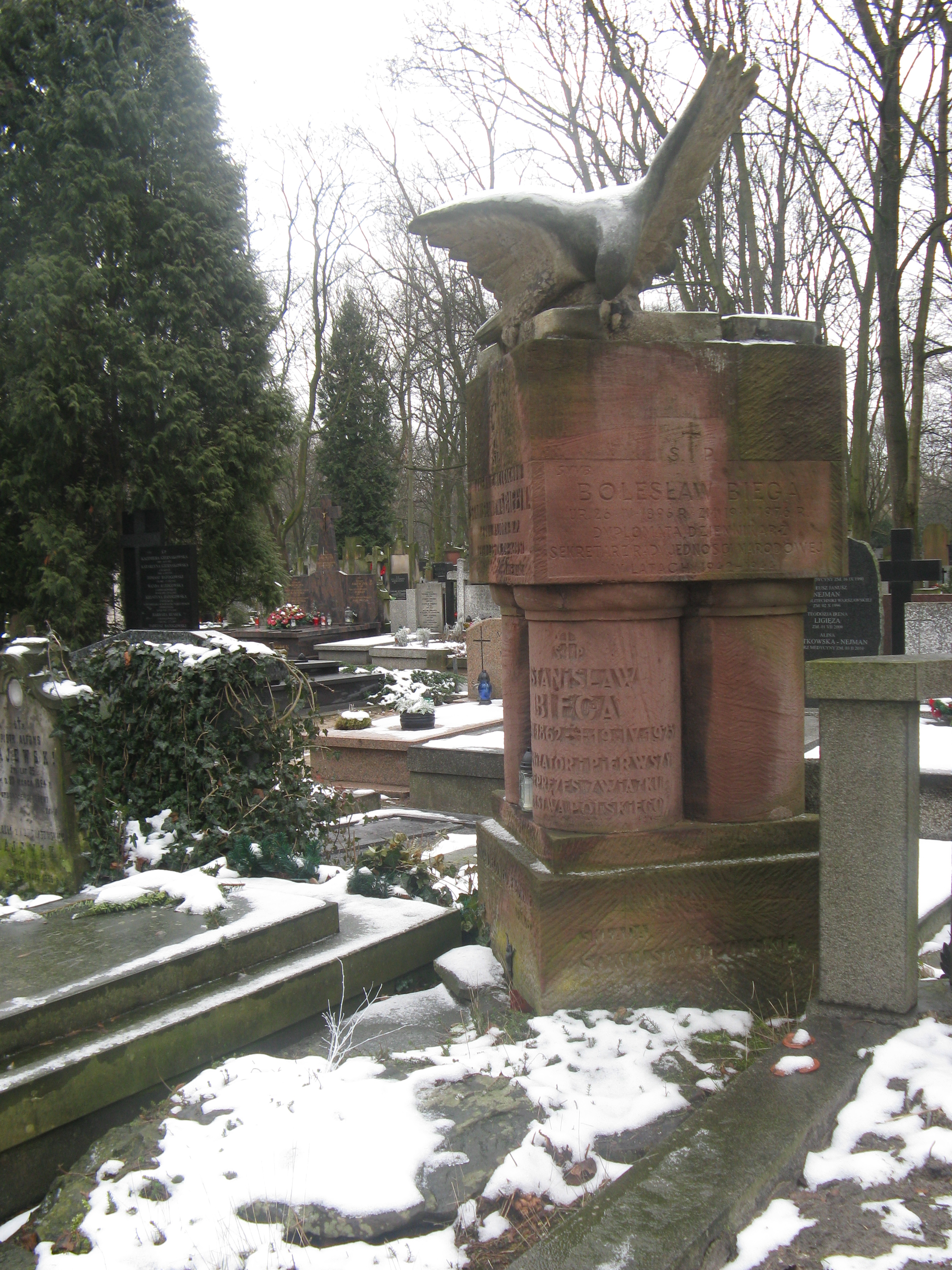 Grób rodziny Biega na Cmentarzu Powązkowskim